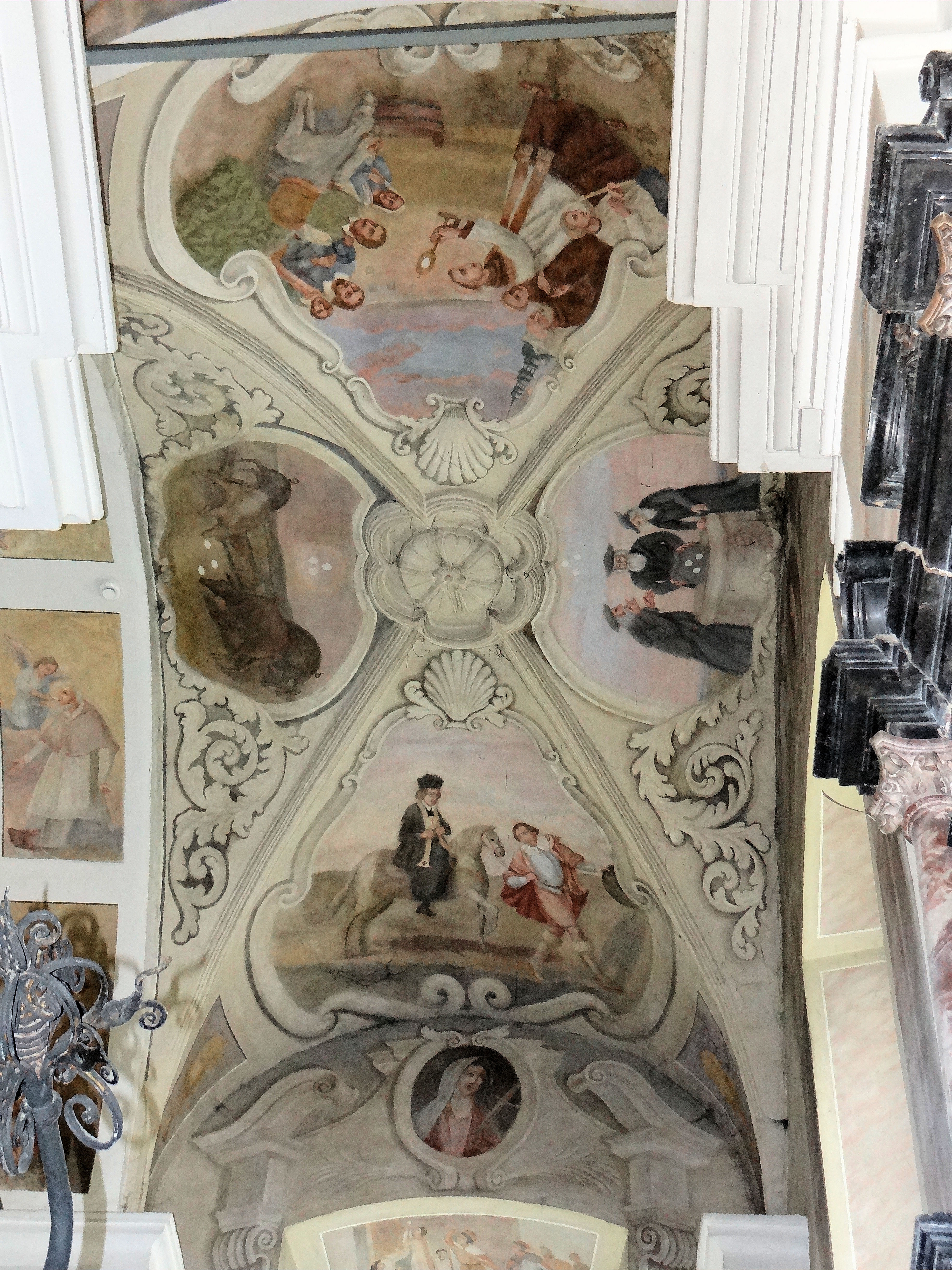 Bazylika Katedralna w Łowiczu - sklepienie nad jedną z kaplic nawy północnej